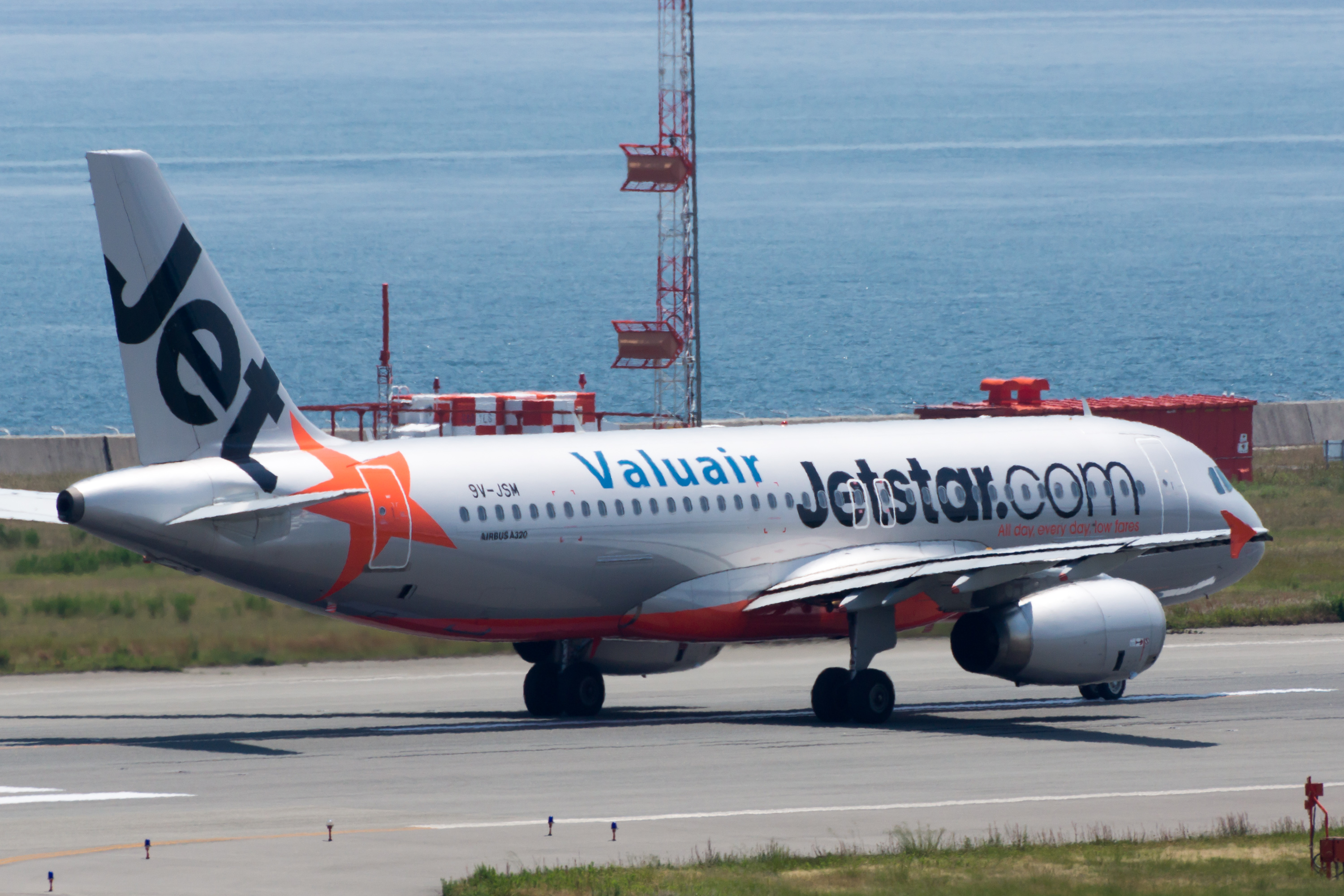 Jetstar Asia Airways / ジェットスター・アジア航空 Airbus A320-232 9V-JSM 3K764, Departed to Singapore via Manila Osaka Kansai Int'l Airport